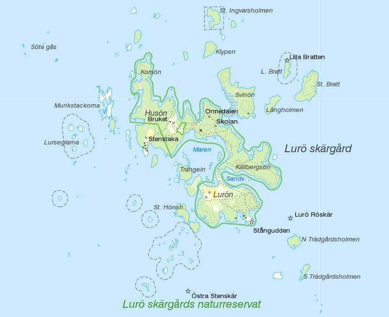 Karta över ön Lurö i Vänern och Värmlandnäs skärgård.